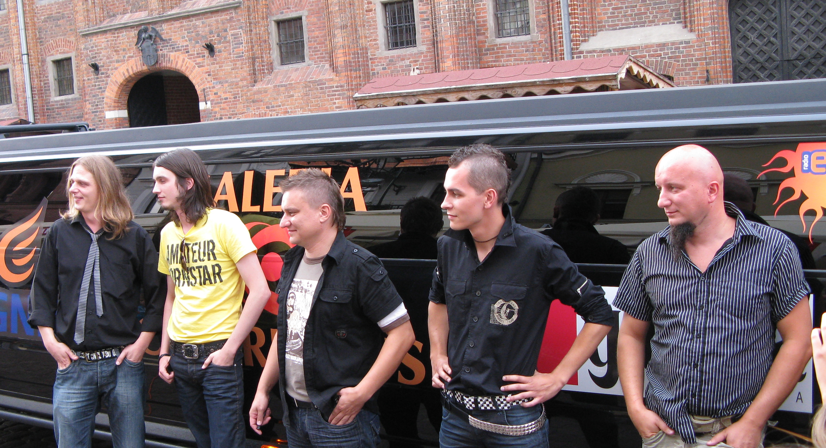 Manchester (grupa muzyczna) on Toruń Old Square Market